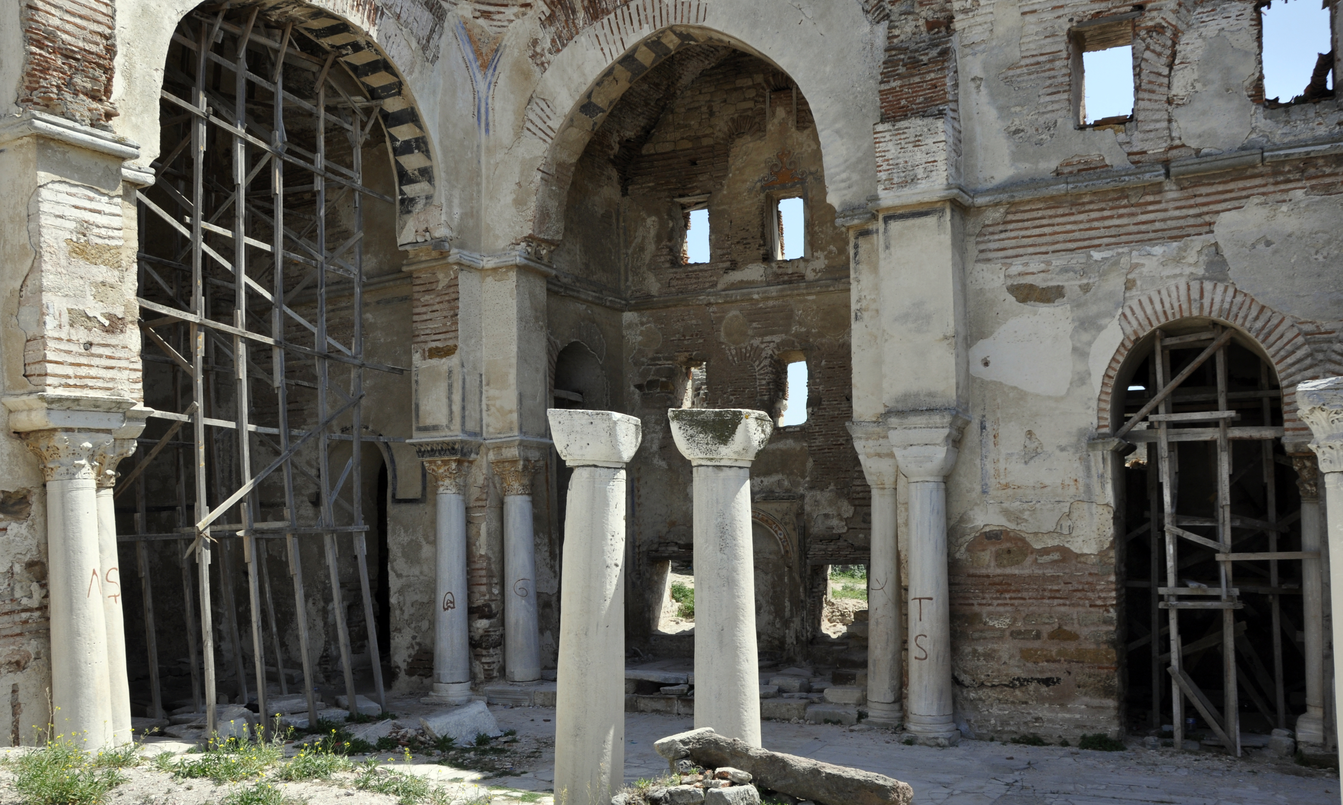 Enez Kalesi